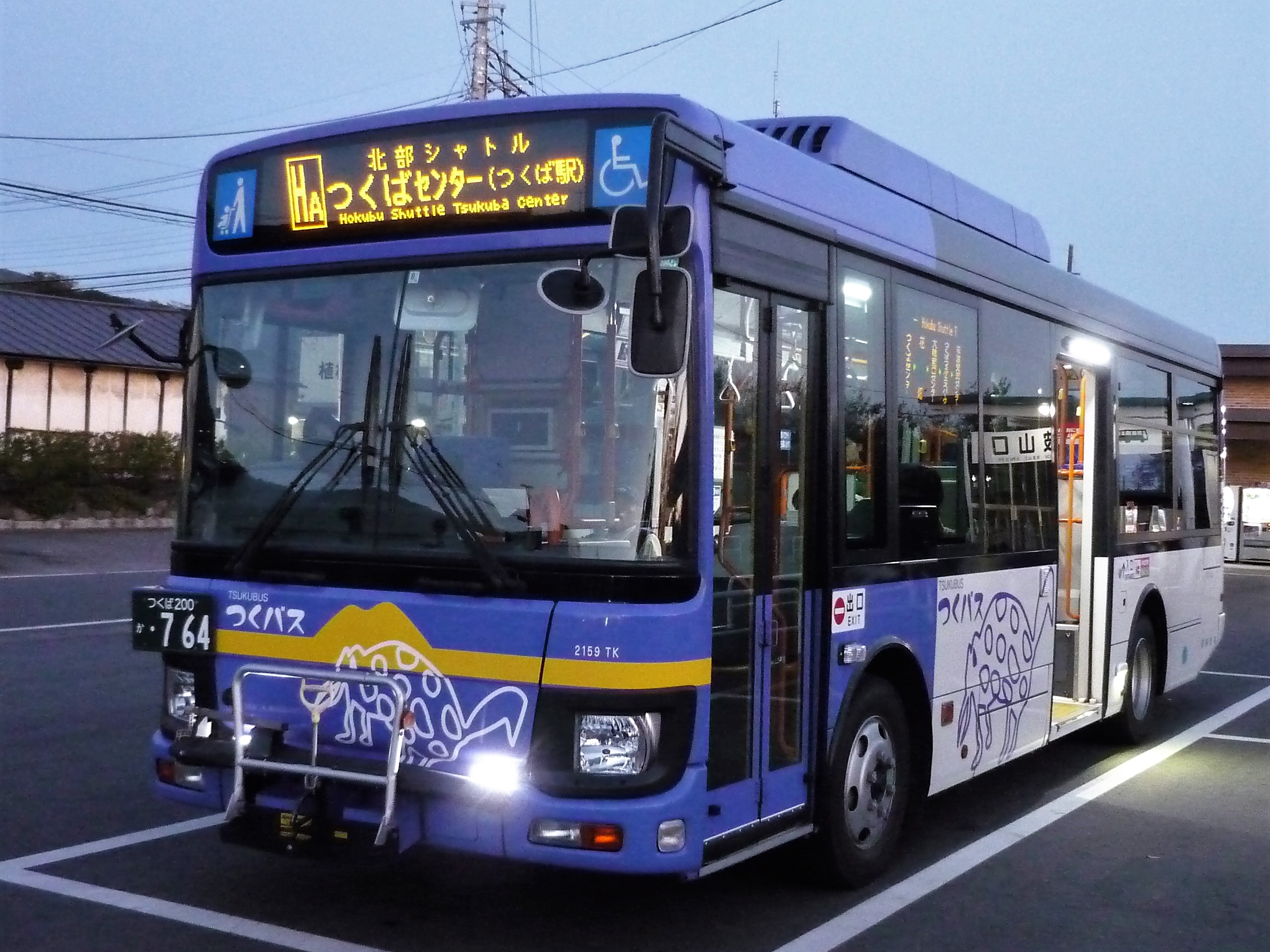 筑波山口バスターミナルに停車中のつくバス北部シャトル Panasonic Lumix DMC-FS3